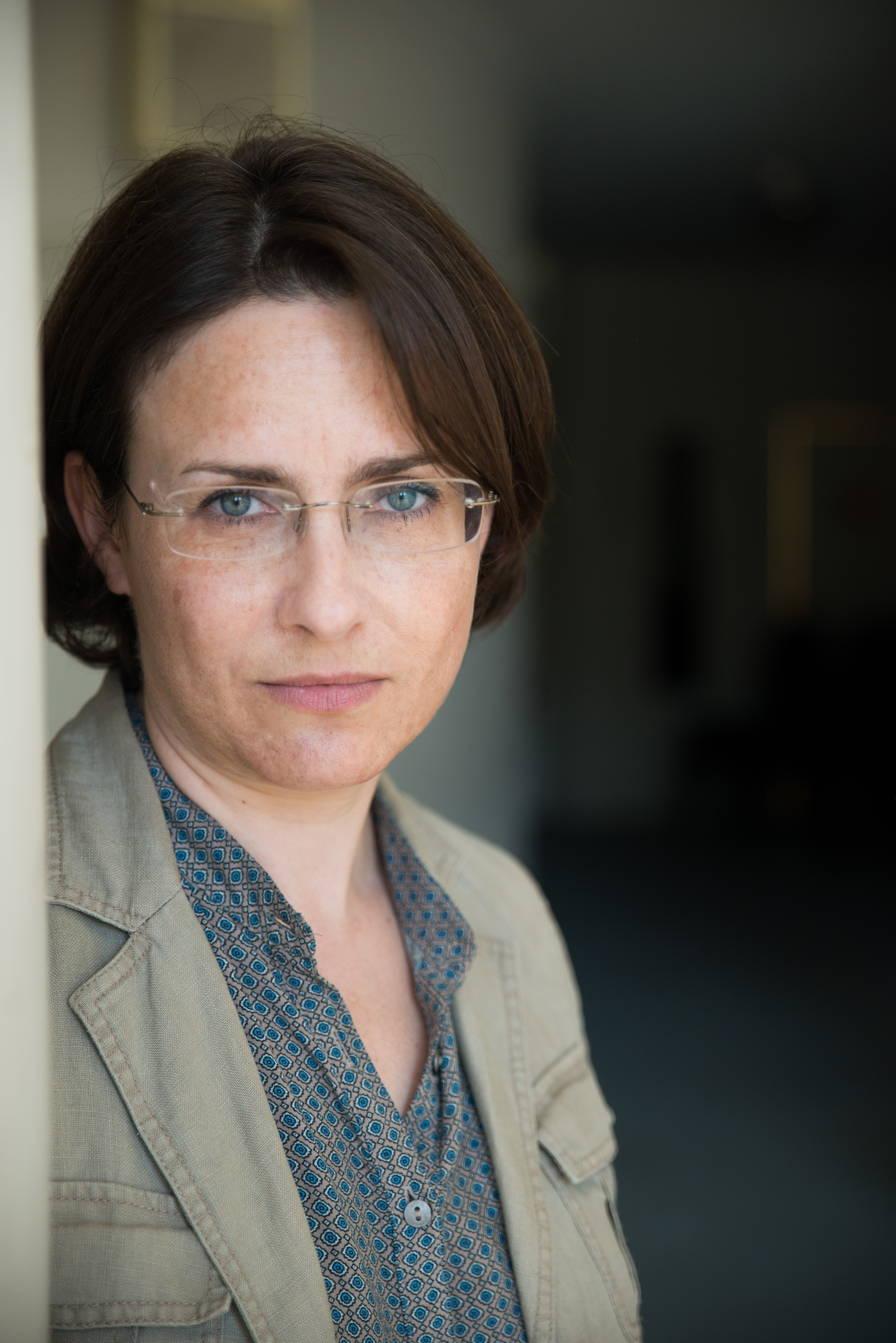 Foto: Markus Stein, Teatr Polski, Poznan 2016